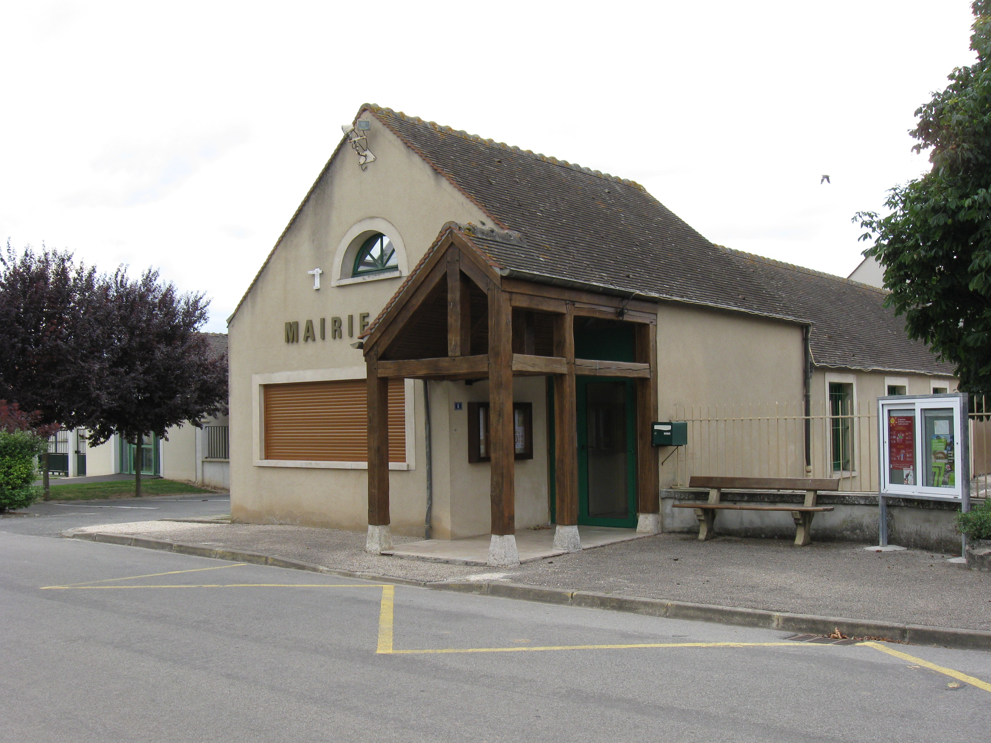 La mairie de Chenou. (Seine-et-Marne, région Île-de-France).